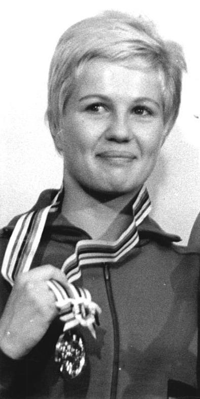 Zentralbild-Kohls 12.10.1964 XVIII. Olympische Sommerspiele Tokio 1964. Stolz und glücklich zeigt die 21jährige Ingrid Engel-Krämer (DDR) ihre Goldmedaille, die sie für ihren Sieg im Kunstspringen am 12.10.1964 aus der Hand des FIWA-Präsidenten Max Ritter (USA) erhalten hatte. (Ausschnitt)